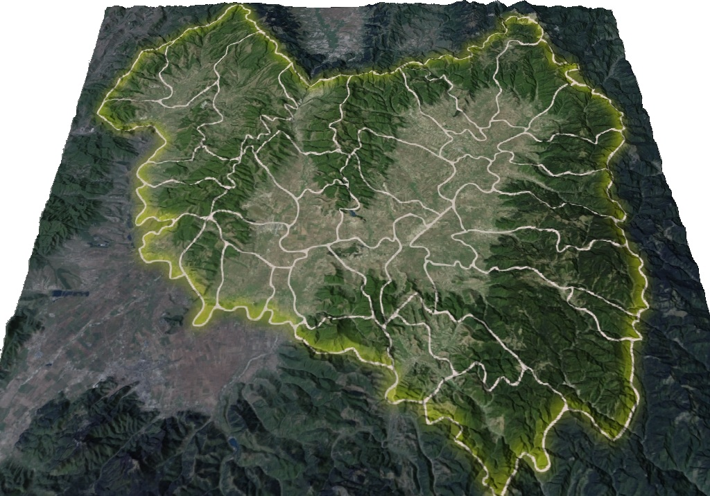 Judetul Covasna din Romania